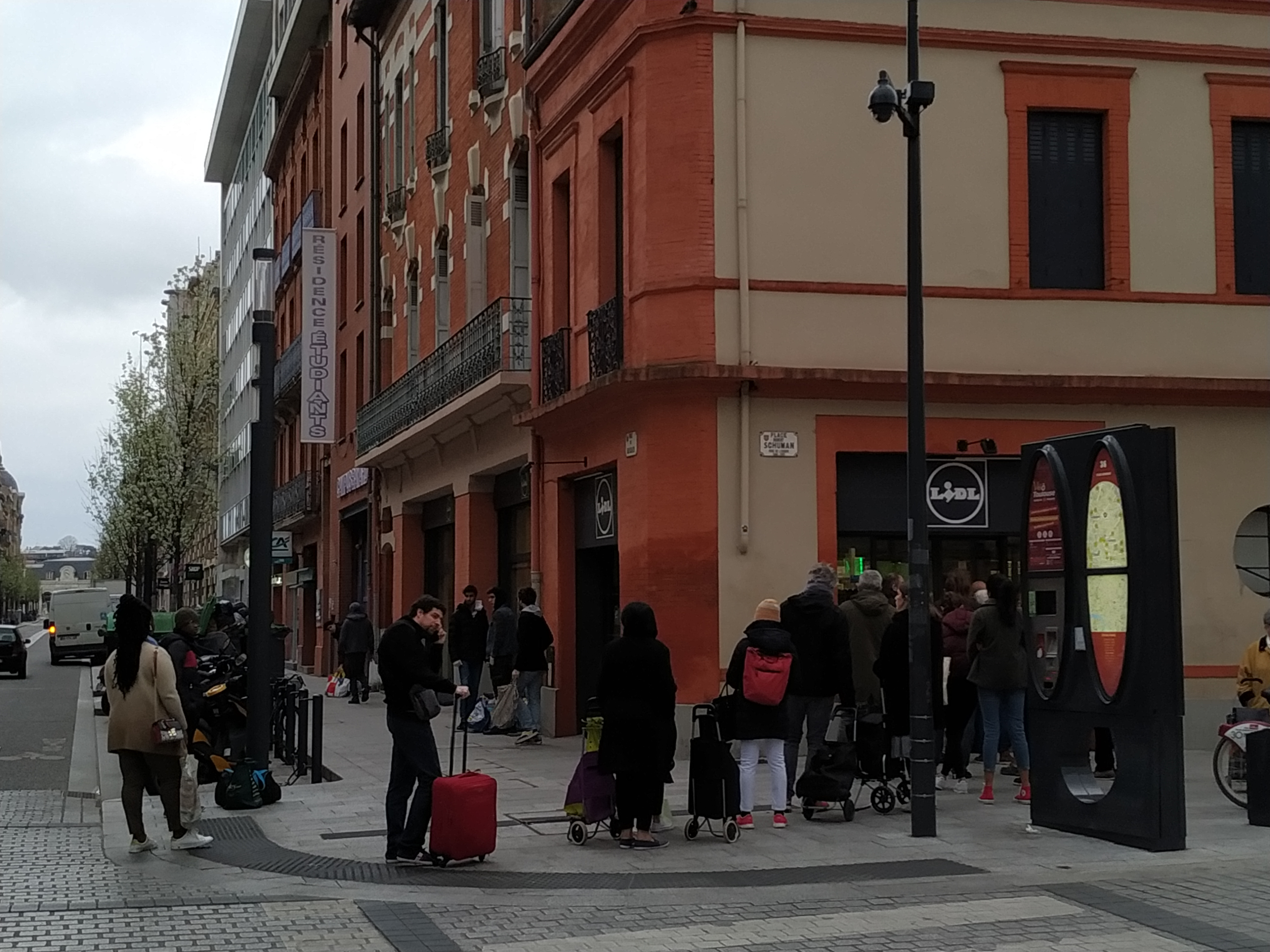 Des clients d'un Lidl de la Rue Bayard faisant la queue à Toulouse, dans le cadre des mesures de Distanciation sociales prises pour lutter contre l'épidémie de Covid-19.